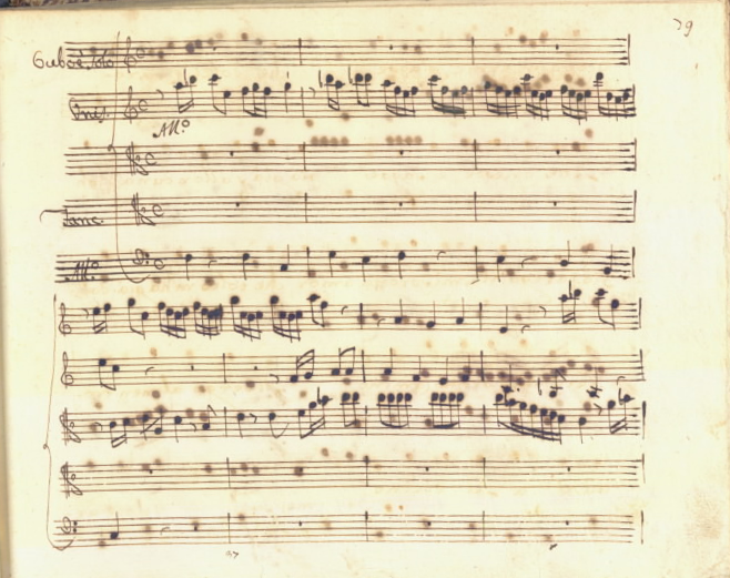 Introduction instrumentale de l'aria de Tancredi, « Come suol veloce ardito » extrait d'Erminia d'Alessandro Scarlatti (1723). Manuscrit, Naples, Cantate 269, folio 79.